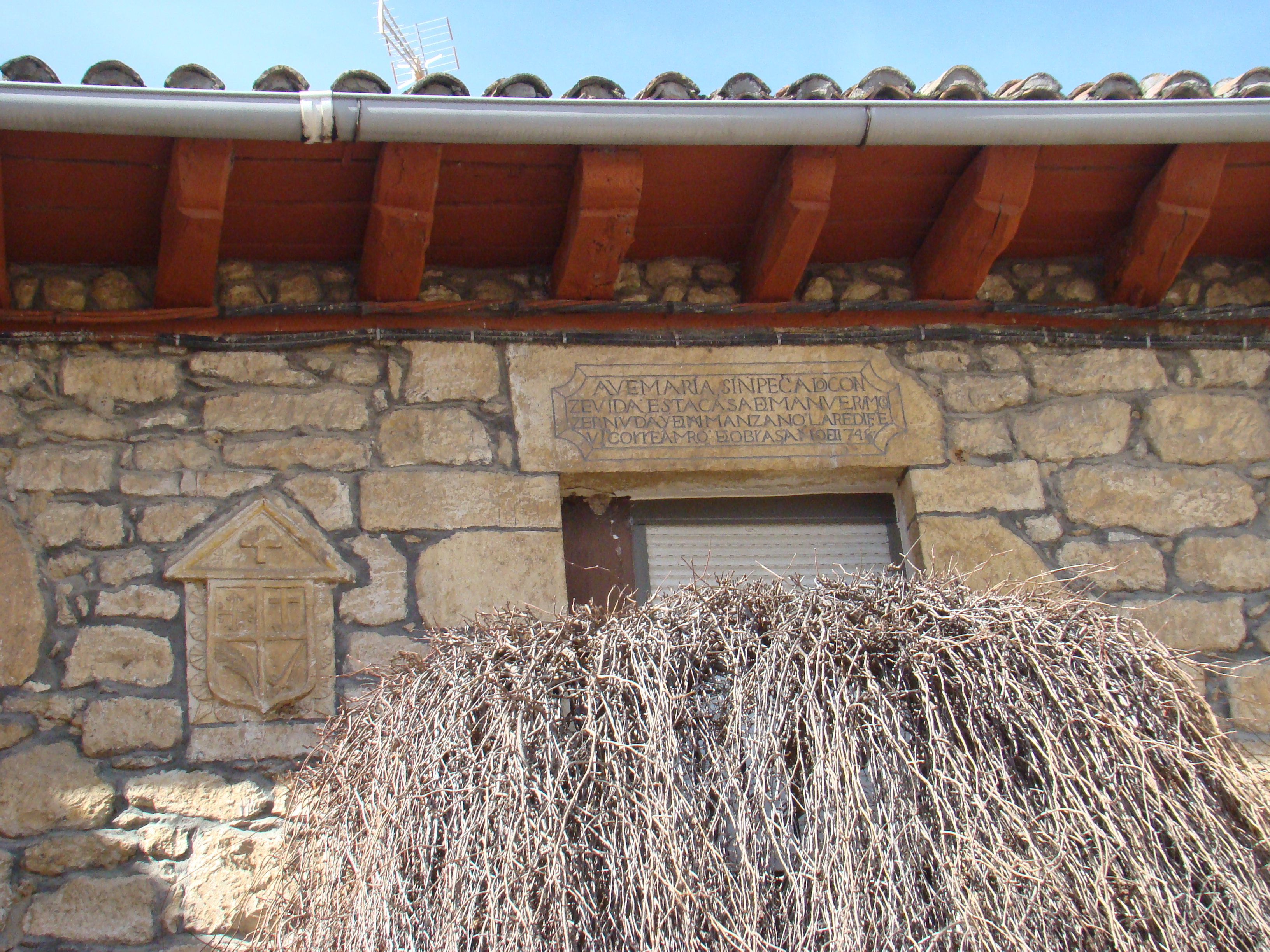 Zaratán, Valladolid (España). Casa que perteneció probablemente a un familiar del Santo Oficio a juzgar por el emblema que ostenta. Está situada en la acera de la plaza Mayor que en tiempos anteriores era la continuación de la calle del Pozo.